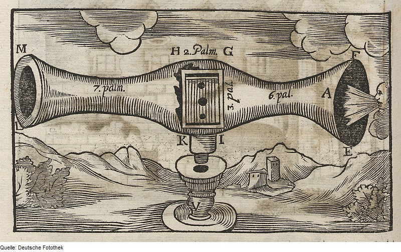 Original image description from the Deutsche Fotothek Akustik & Schall & Windharfe & Aeolsharfe & Musikinstrument & Saiteninstrument & Rohr & Ordensliteratur